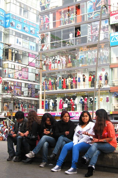 Centro comercial Gamarra, La Victoria, Lima (Perú)